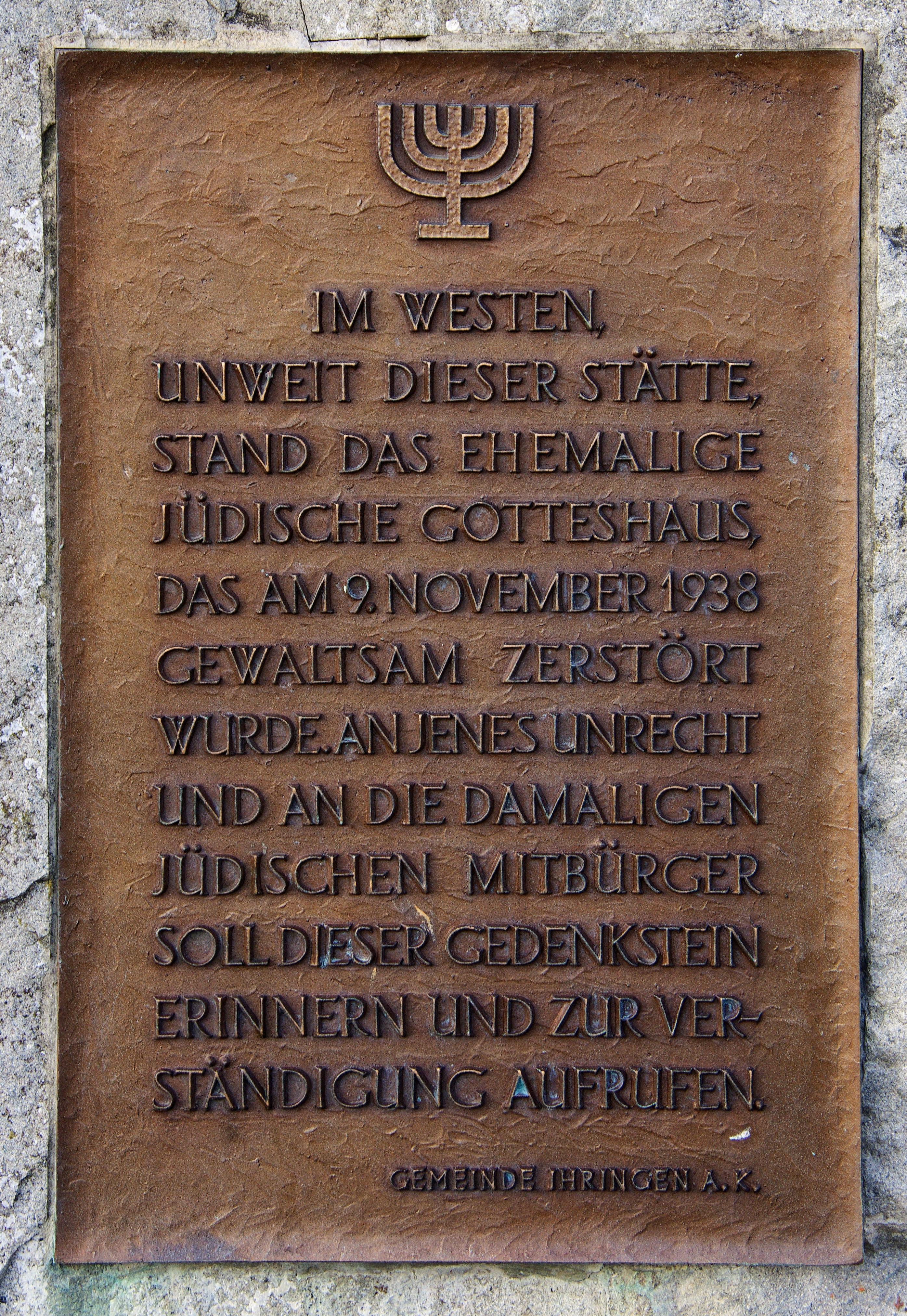 Die Tafel auf dem Gedenkstein für die Synagoge in Ihringen, die von den Nazis zerstört wurde